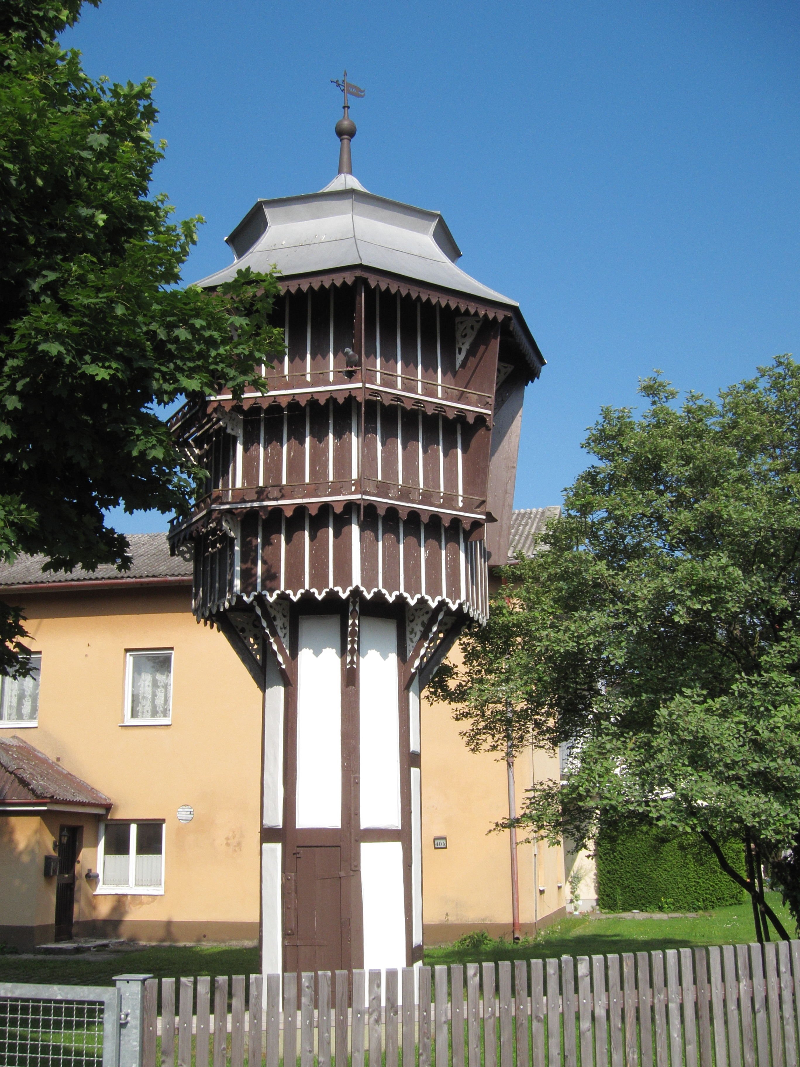 Eglharting, Hauptstr. 40a, Zugehöriger großer Taubenkobel, bez. 1895.